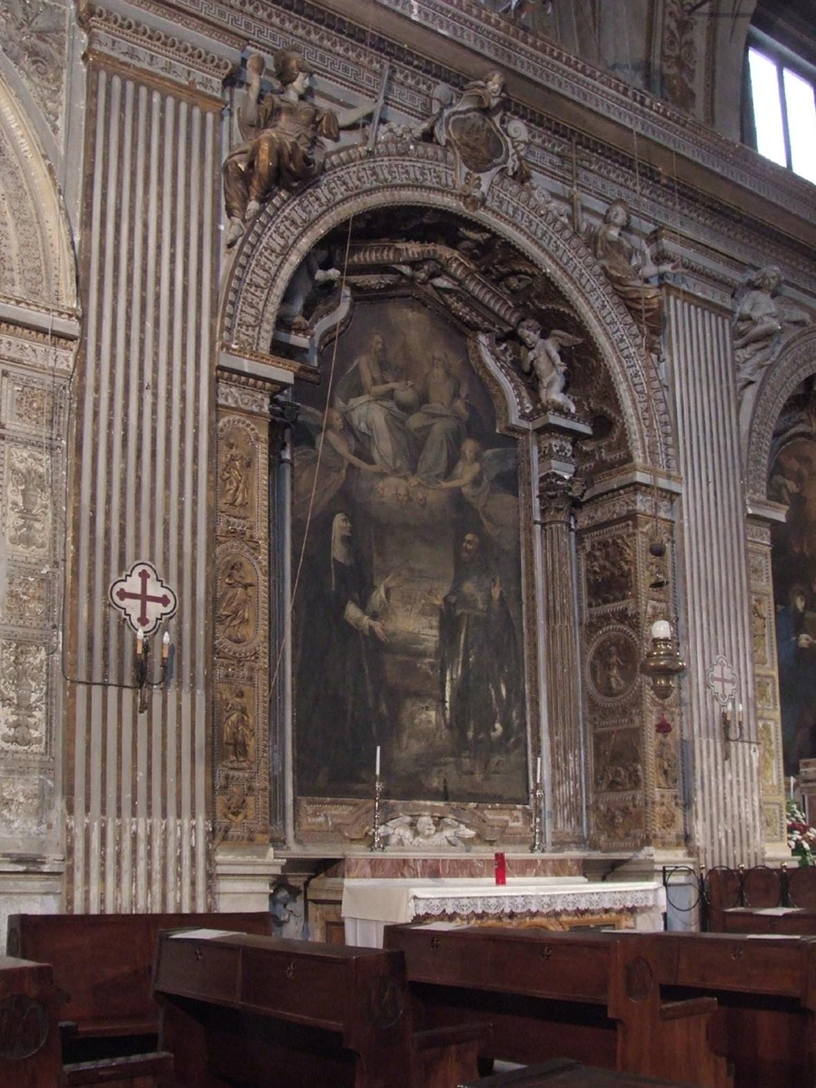 Santa Lucia dei Selci, Roma, Capella Landi